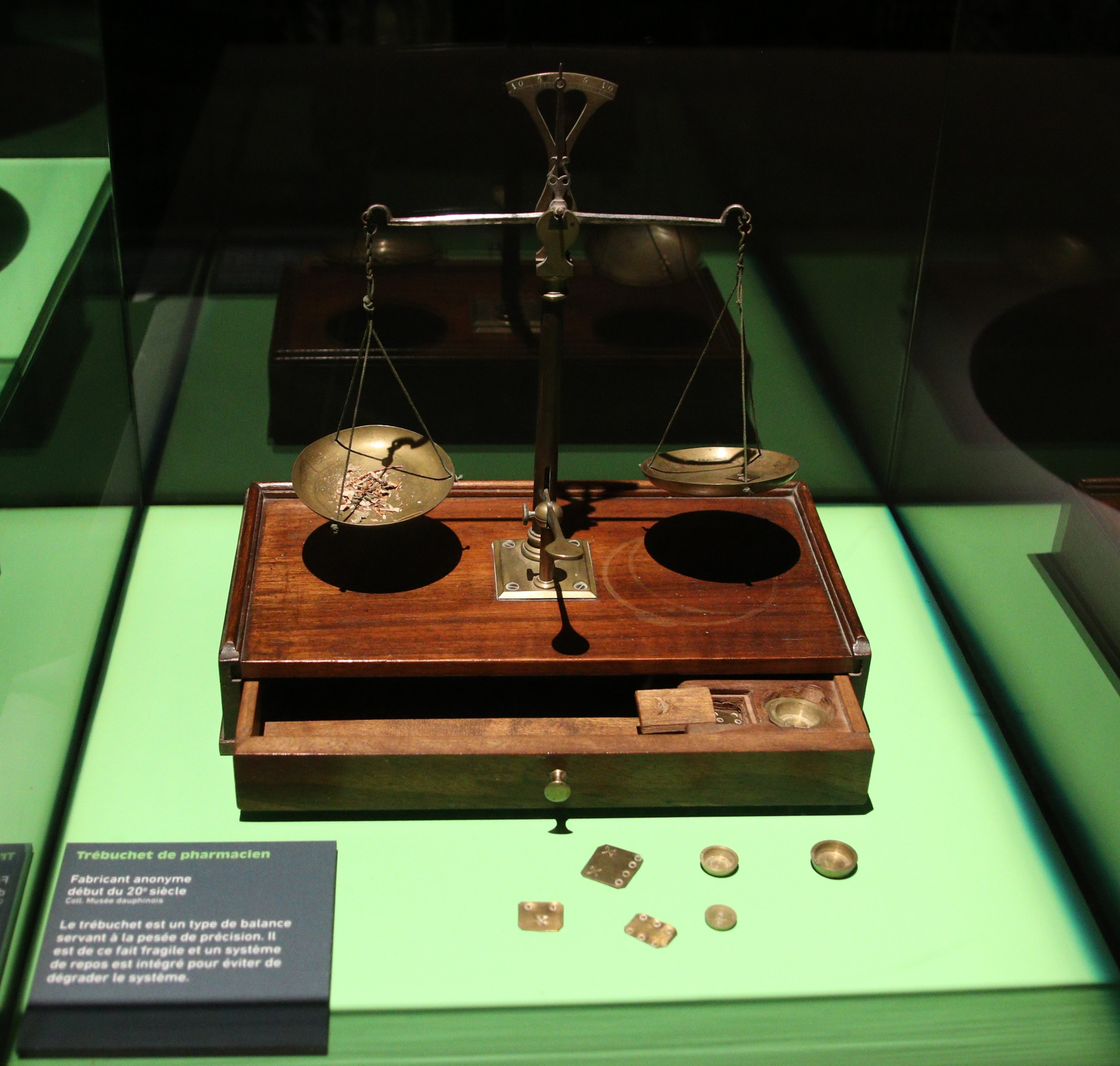 Trébuchet de pharmacien; fabricant anonyme, début du 20e siècle, Coll. Musée dauphinois. Exposition temporaire "L'ivresse des sommets" au Musée dauphinois, Grenoble.